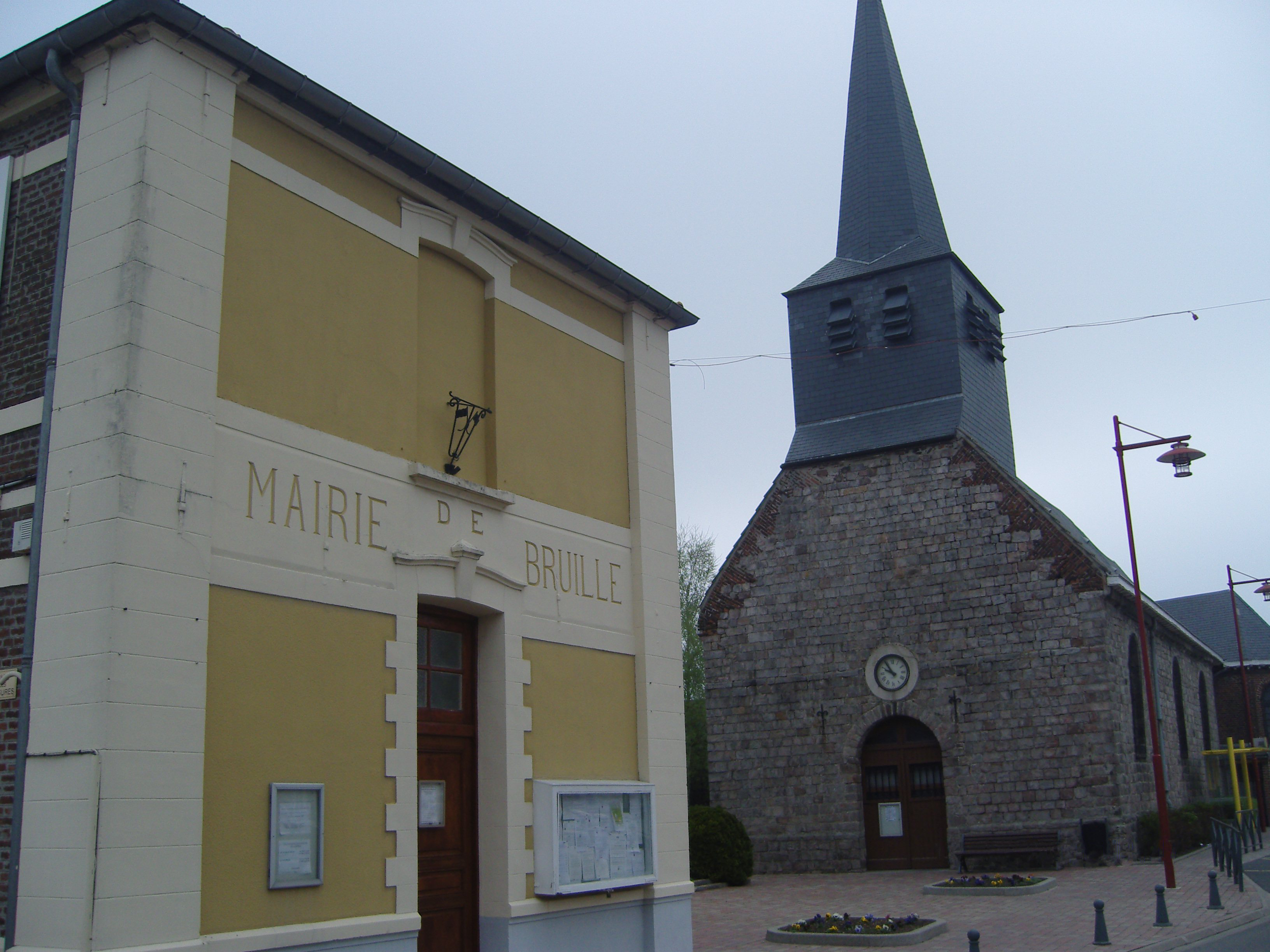 Bruille-lez-Marchiennes Mairie & église